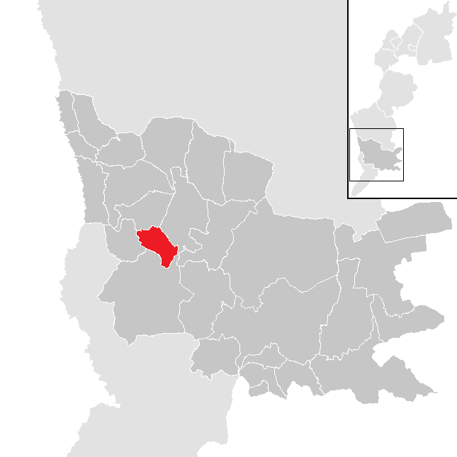 Bezirk Güssing